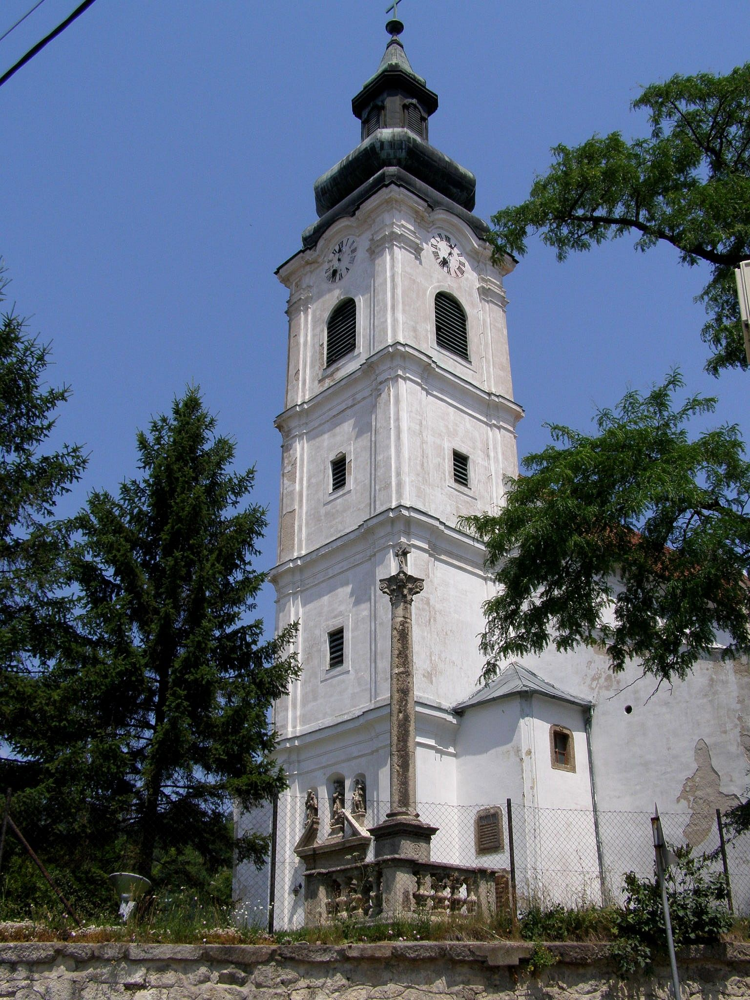 Devín, Kostol svätého Kríža; veža kostola so zvonicou